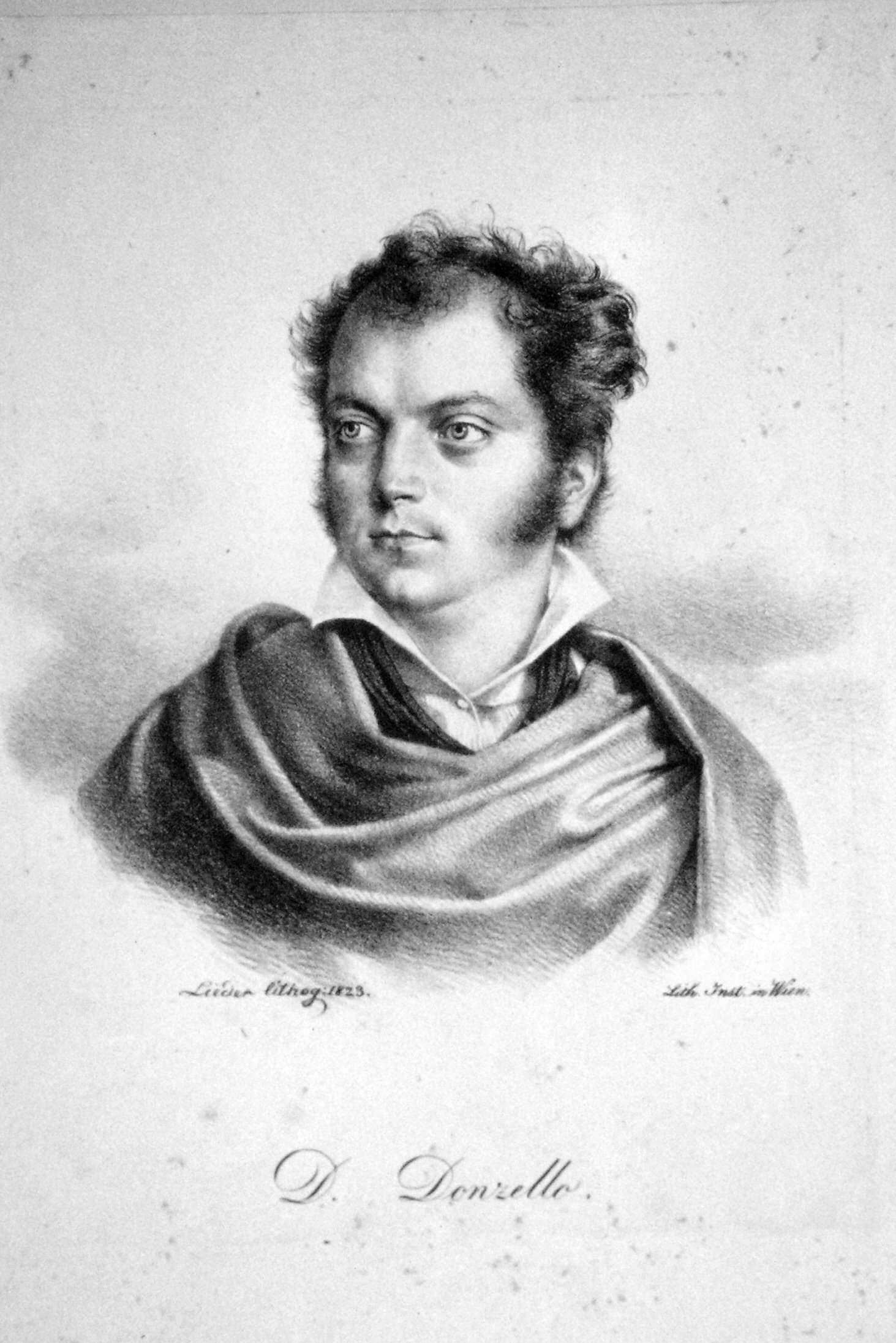 Domenico Donzelli (1791-1873), italienischer Opernsänger (Tenor). Lithographie von Friedrich Lieder, 1823